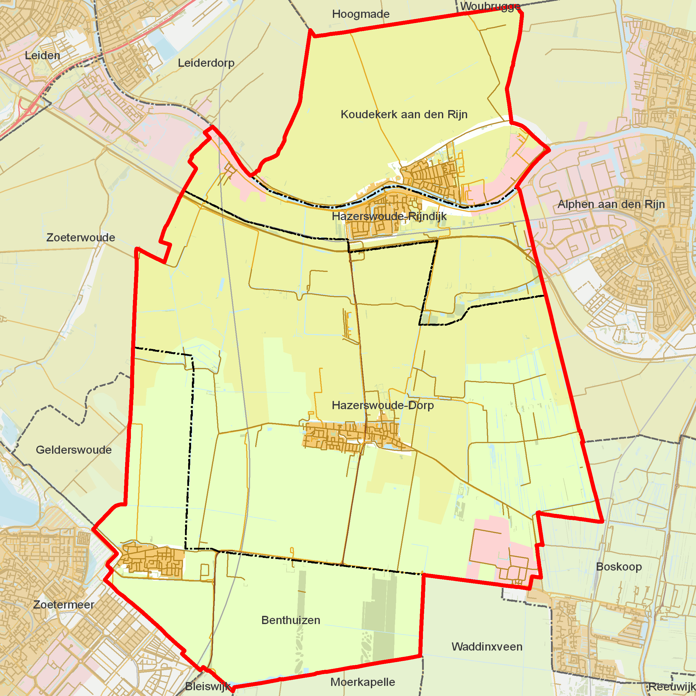 BAG woonplaatsen - Gemeente Rijnwoude.png